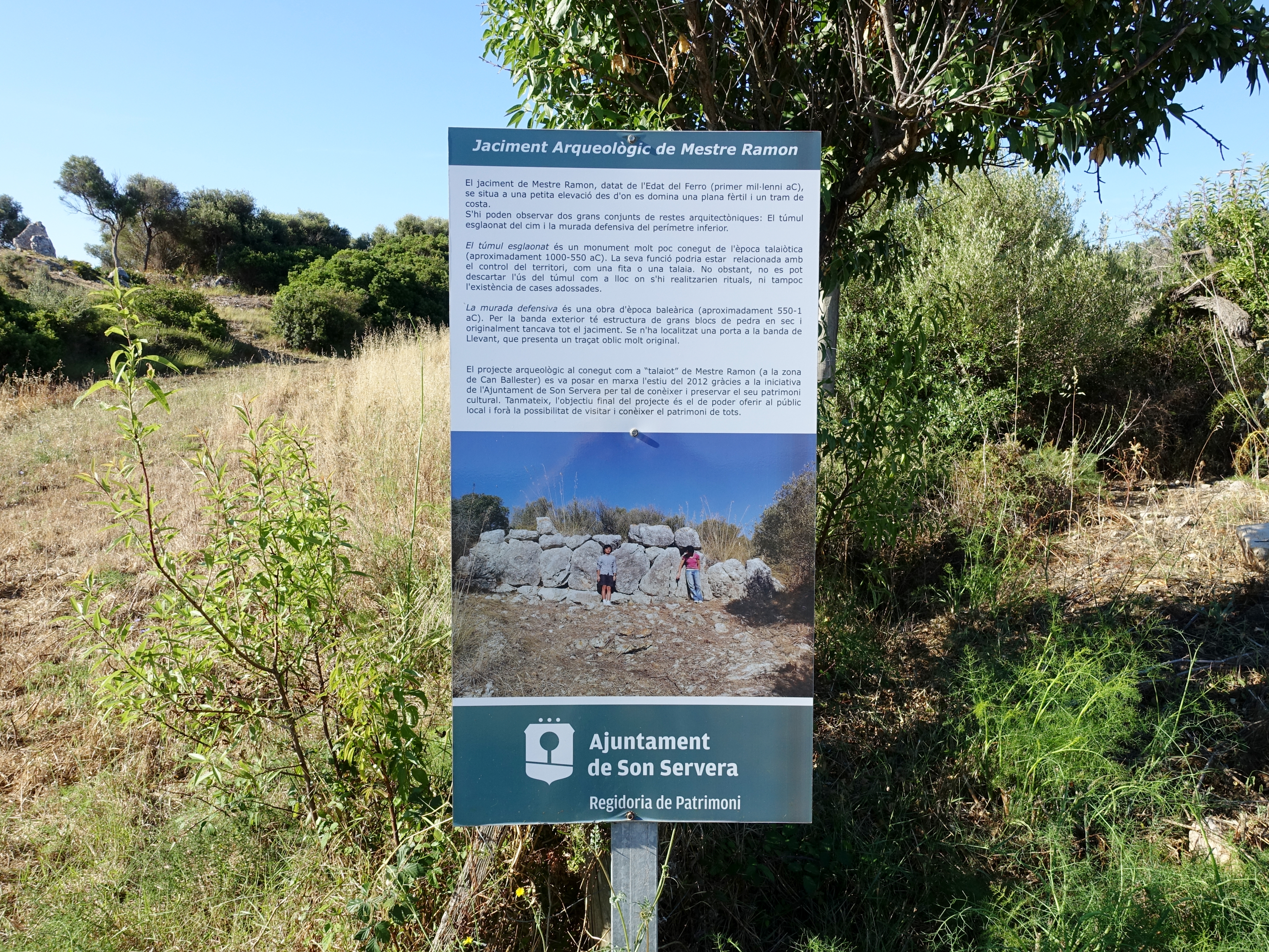 Hinweisschild an der Ausgrabungsstätte Mestre Ramon, Gemeinde Son Servera, Mallorca, Spanien